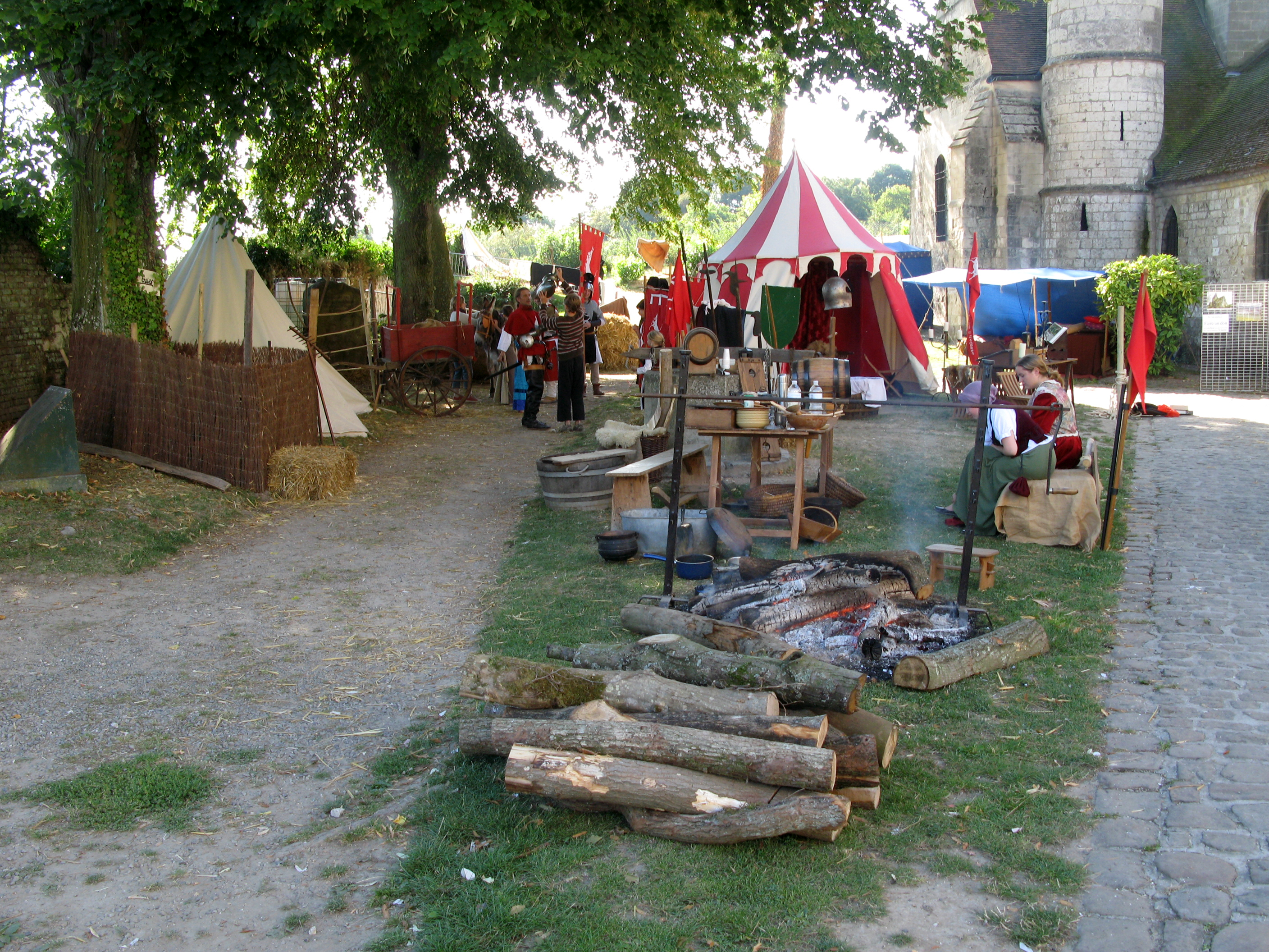 Picquigny (Somme, France) - Quatrième fête médiévale. Dans la matinée du 2ème jour de la fête (dimanche), le campement des groupes installés entre le Pavillon Sévigné et la collégiale s'anime avant le départ du défilé costumé en ville. .